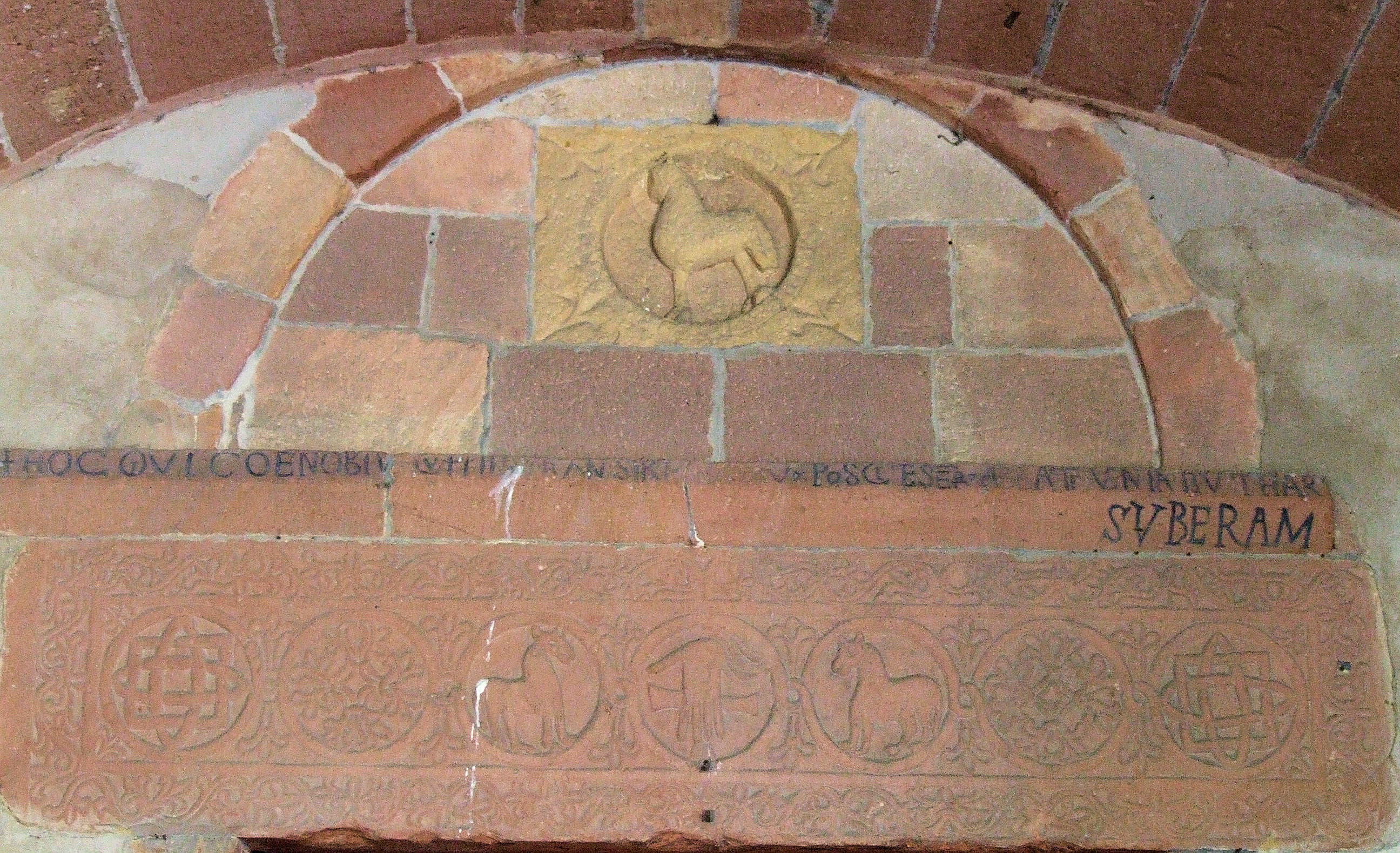 Wissembourg - Église Saint-Ulrich d'Altenstadt - Détail du tympan: Agneau de Dieu et 7 médaillons en symétrie (main, agneaux et motifs végétaux)